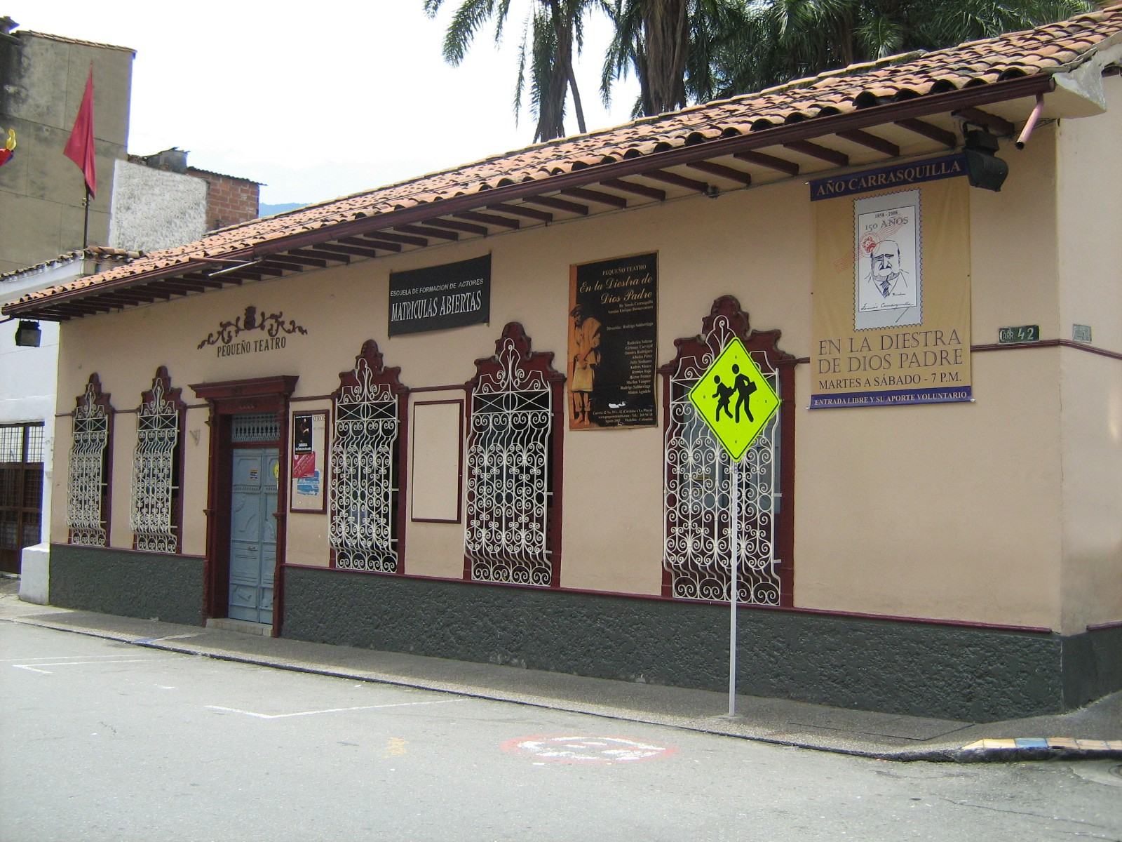 Pequeño Teatro de Medellín, Colombia